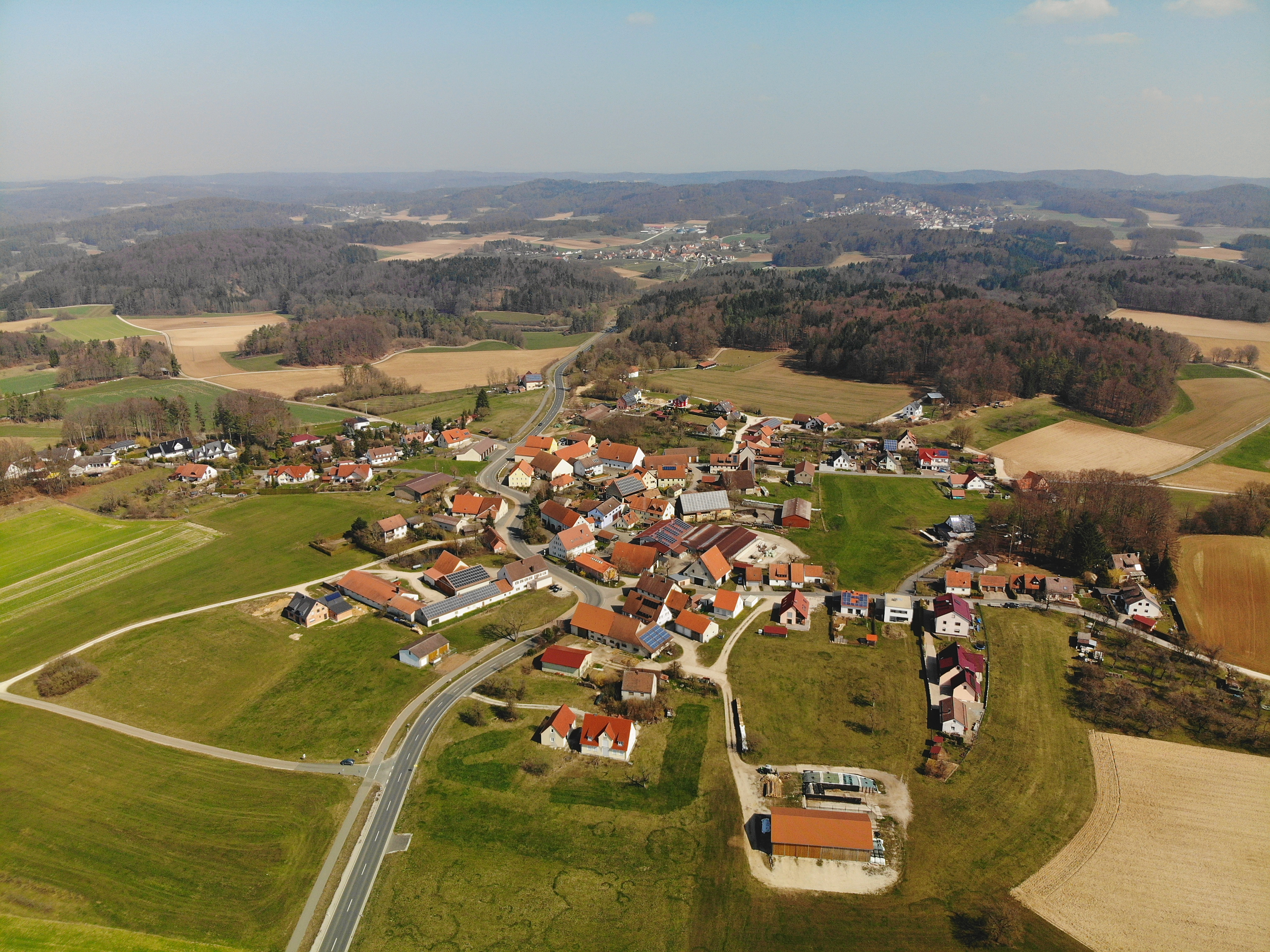 Kemmathen (Hiltpoltstein) Luftaufnahme (2020)